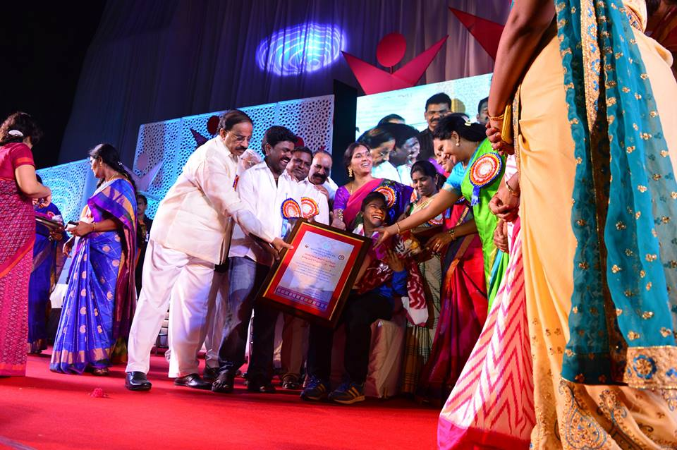 తెలంగాణ రాష్ట్ర విశిష్ట మహిళా పురస్కారం అందుకుంటున్న ప్రియదర్శిని